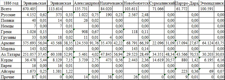 Сводные данные посемейных списков Кавказа за 1886 год